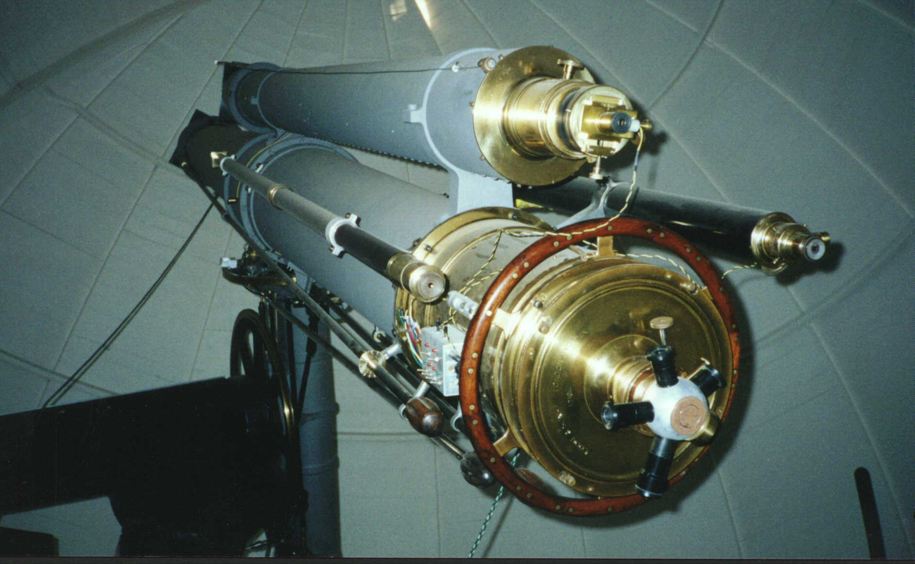 Telescópio refrator Cooke & Sons de 0.32 m, do Observatório do Valongo da UFRJ. 0.32 m Cooke & Sons Refractor from the Valongo Observatory